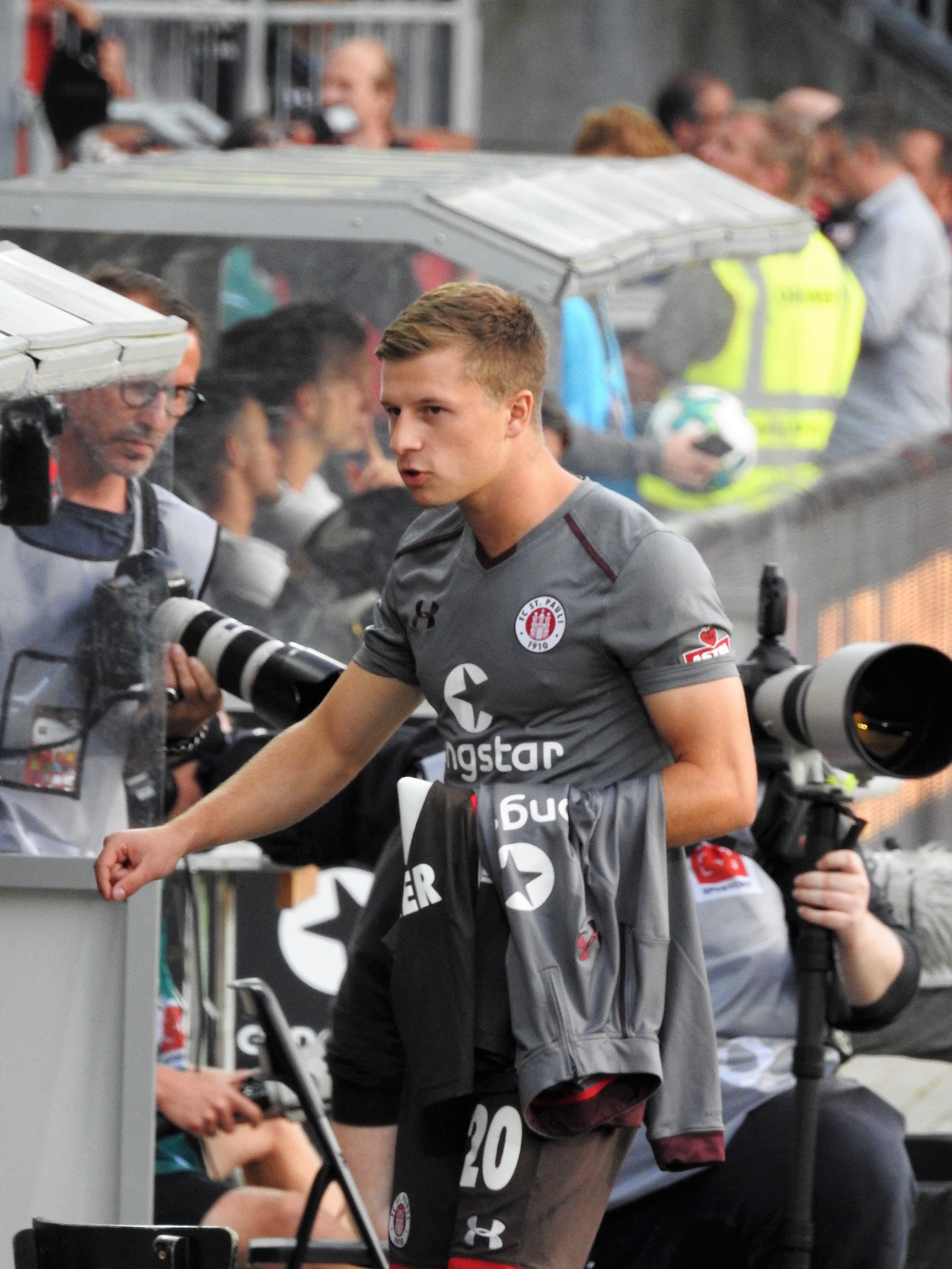 Richard Neudecker, FC St. Pauli